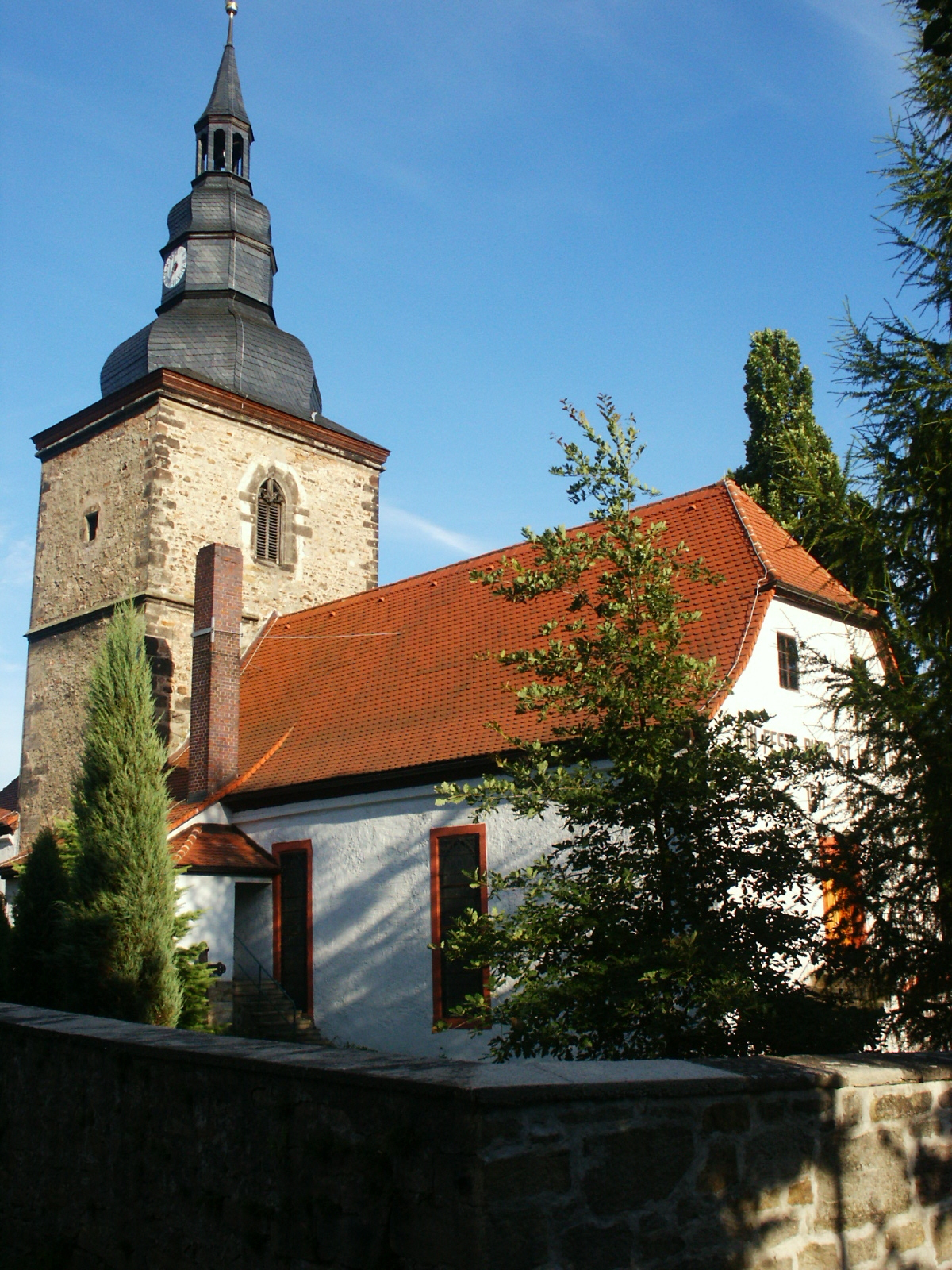 Uhlstädter Kirche